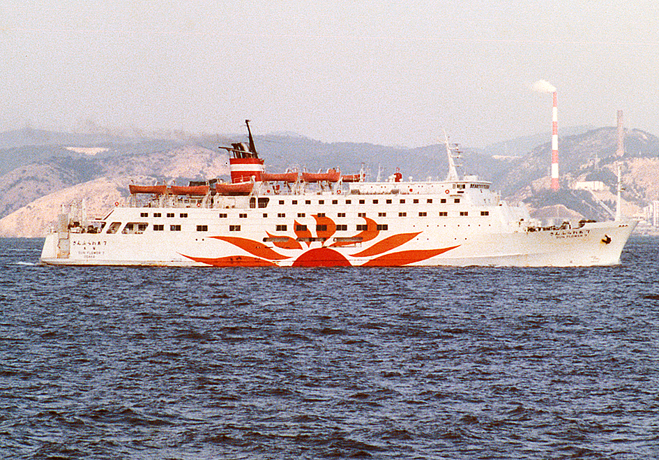 関西汽船 さんふらわあ7